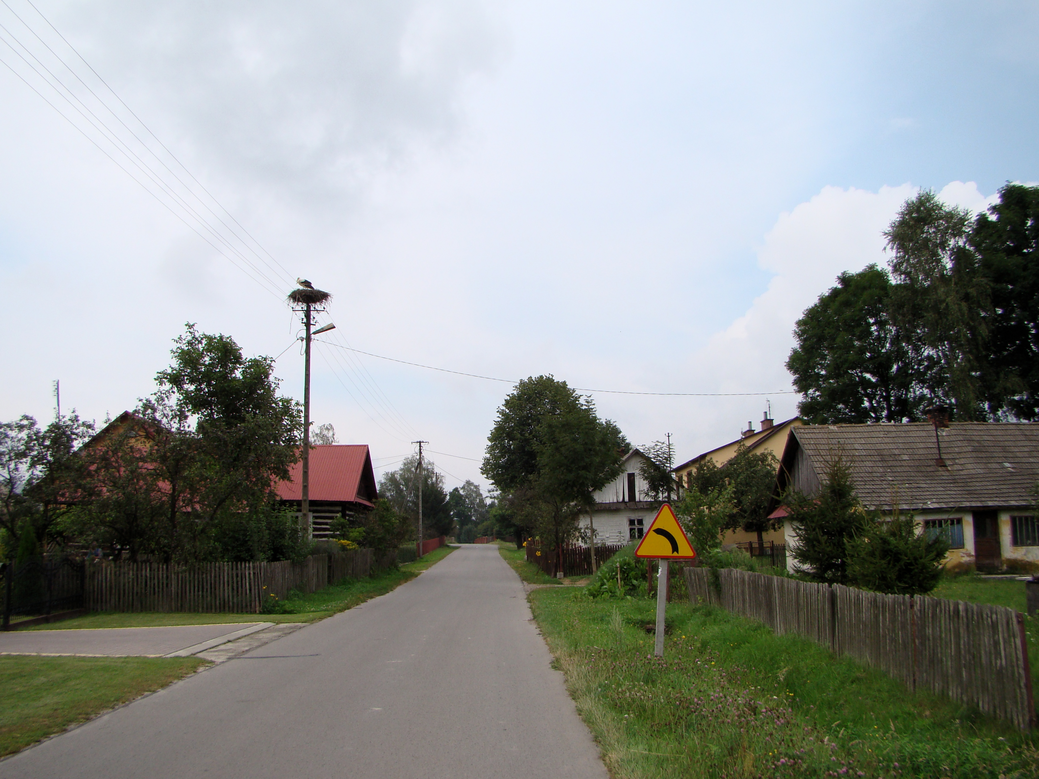 Zielonka/Wola Raniżowska,Poręby Wolskie - bocianie gniazdo